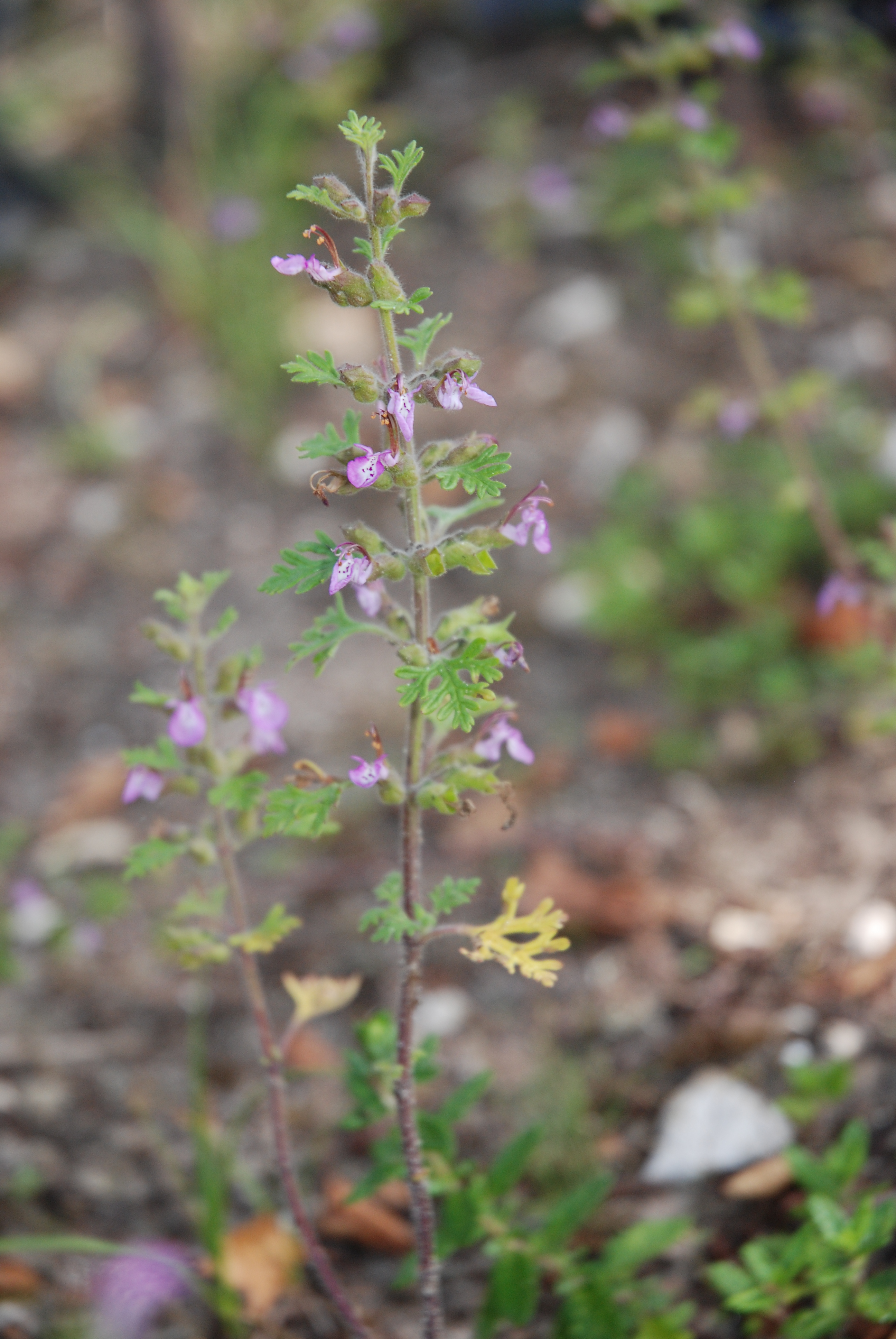 Teucrium botrys Sablière à Fère-en-Tardenois (Aisne), France